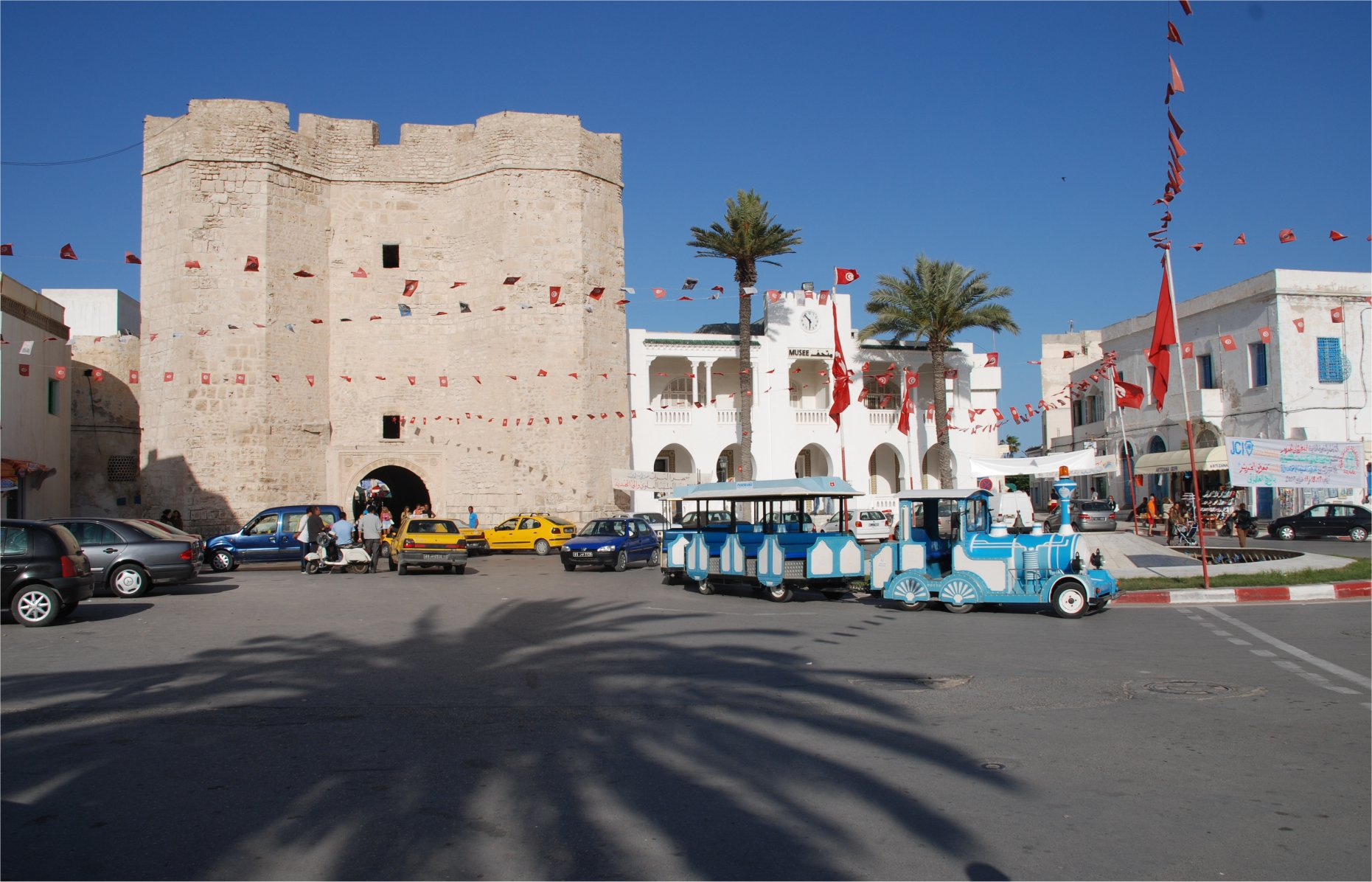 pl wiki